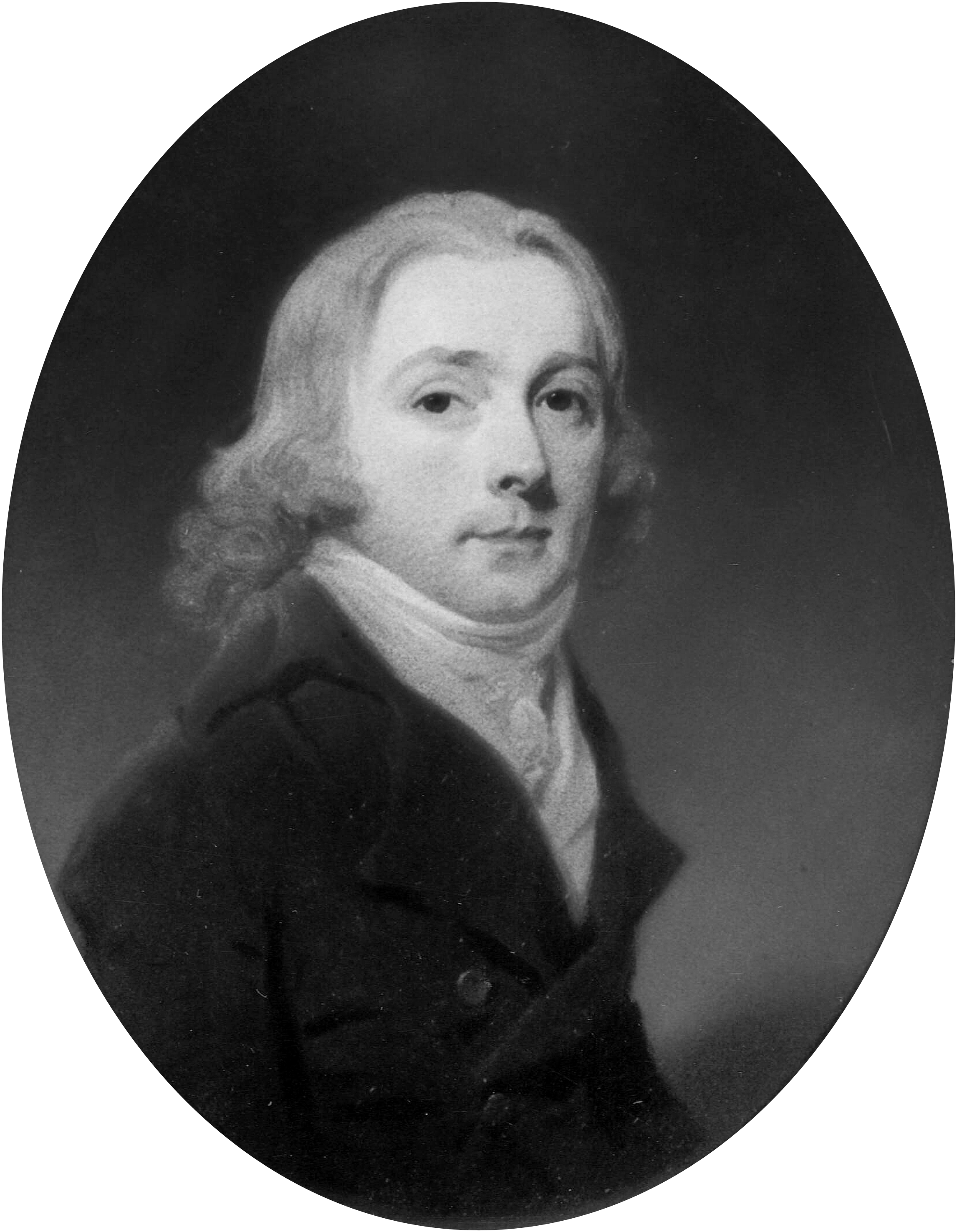 Hendrik baron Fagel (1765-1838), ook genoemd Hendrik Fagel de Jonge, was een Nederlands ambtenaar, politicus en diplomaat, Grootmeester van het Huis van de Prins van Oranje (1828-1830) en vanaf 1830 Minister van Staat